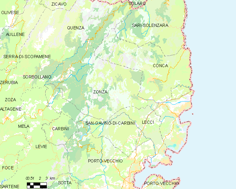 Map commune FR insee code 2A362.png, Corse-du-Sud